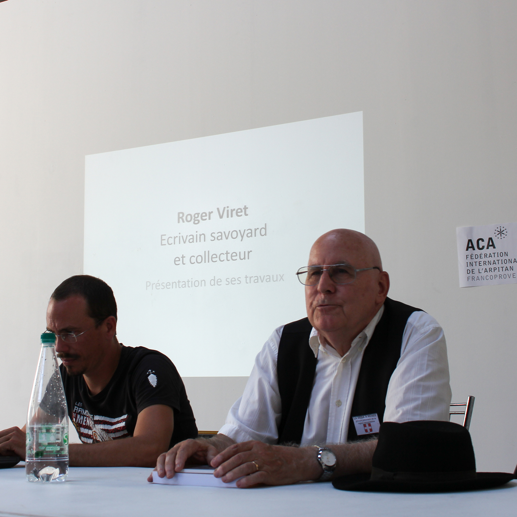 Roger Viret, auteur savoyard arpitanophone. Ici lors de la 37e Fête internationale de la langue arpitane, Saint-Etienne, 2016.